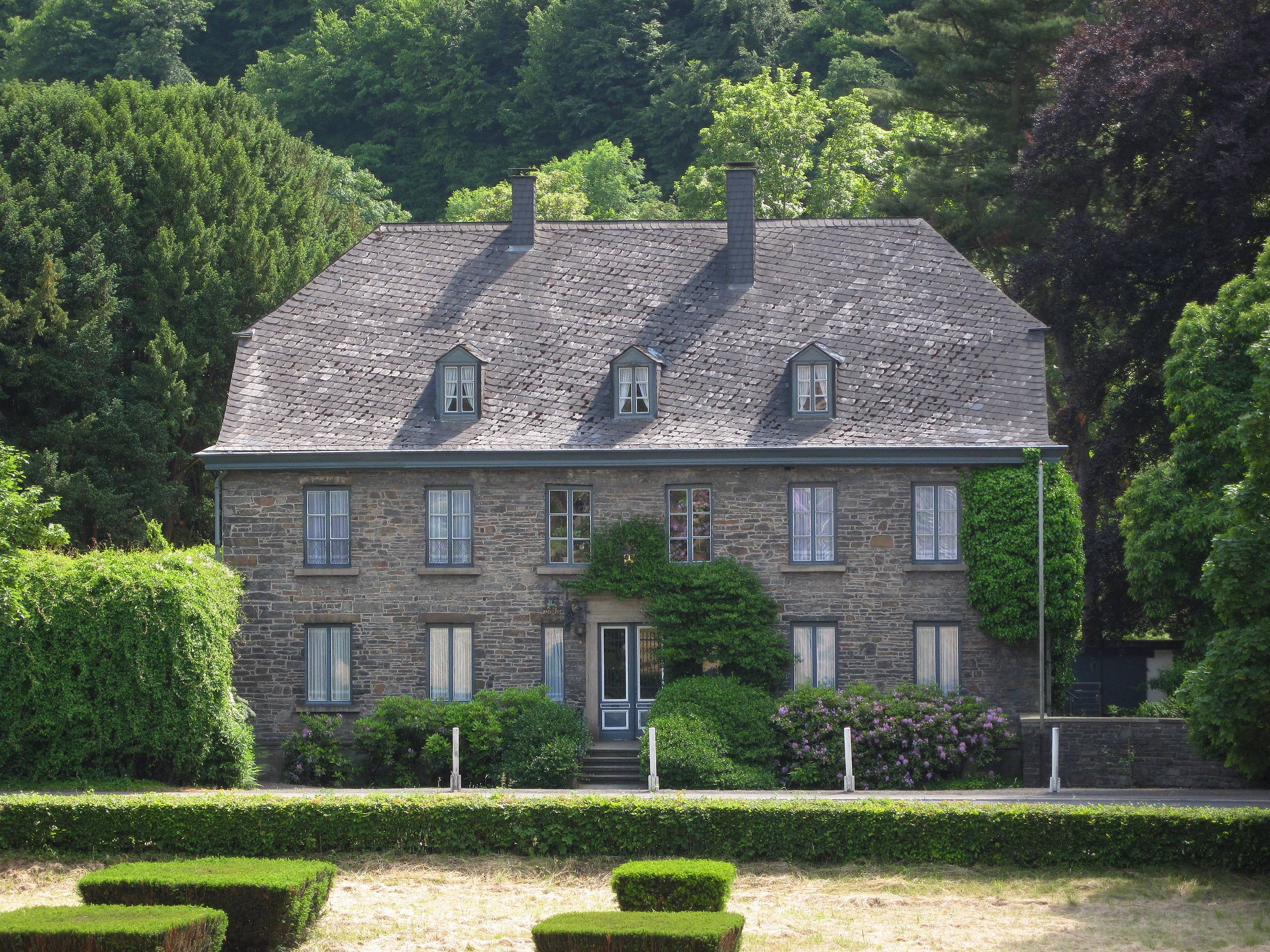 Haus Nachrodt in Nachrodt-Wiblingwerde, Hagener Straße 51-55. Klassizistisches Herrenhaus, Hausnummer 51. This image shows a heritage building in Germany, located in the North Rhine-Westphalian city Nachrodt-Wiblingwerde (no. 4).